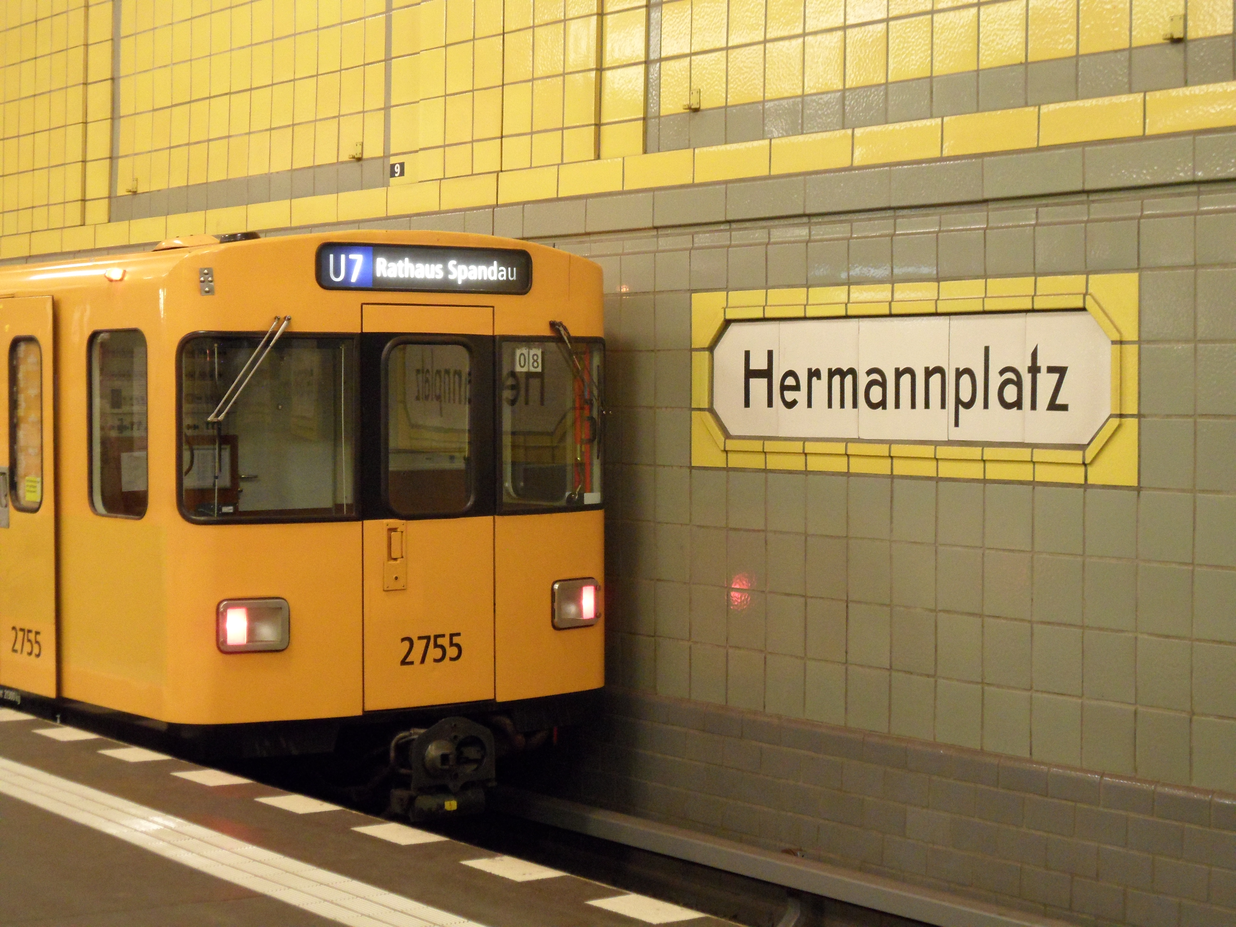 Berlin - U-Bahnhof Hermannplatz - Linien U7 und U8